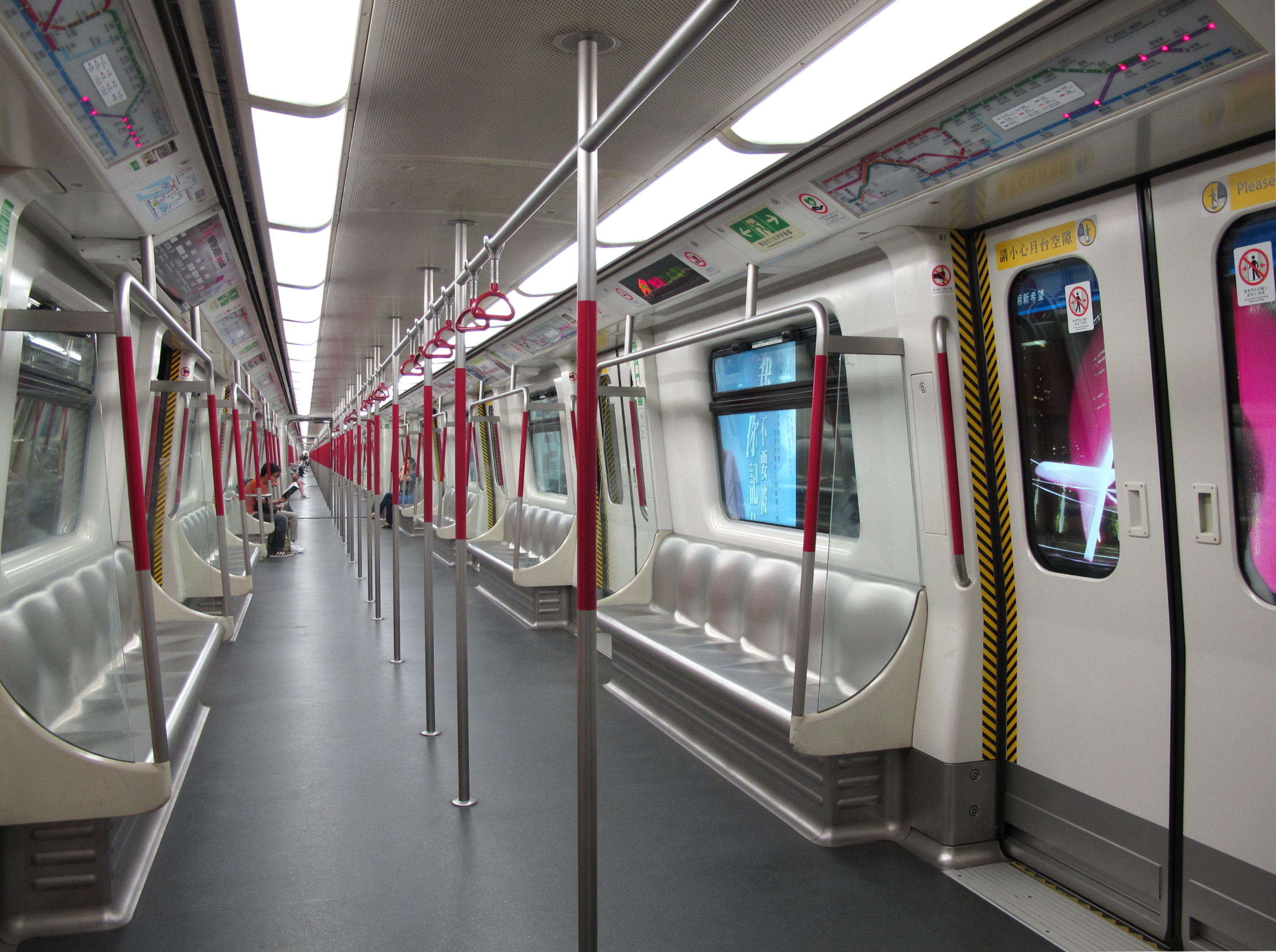 K-Stock Interior 港鐵Rotem電動列車車廂內部